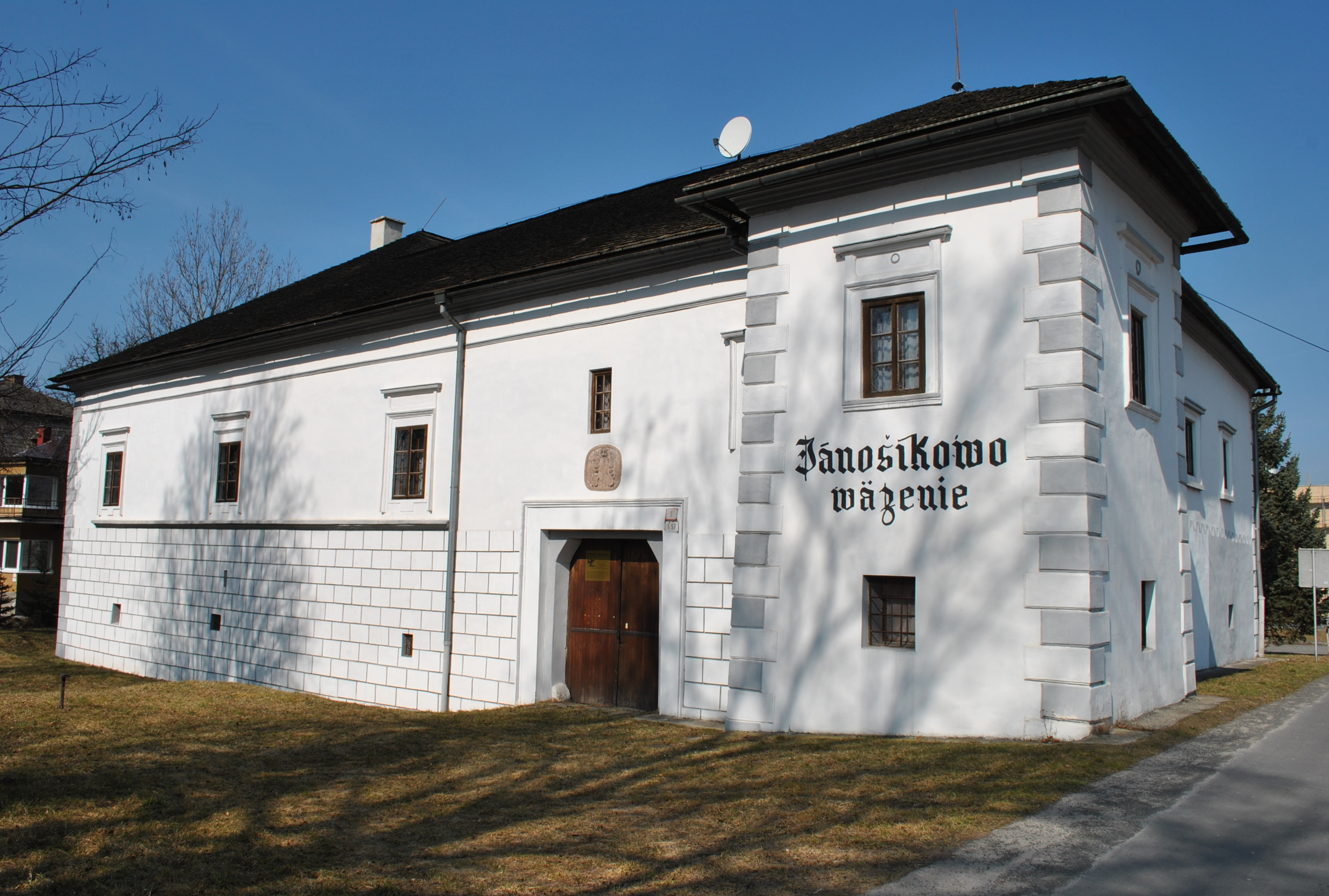 Kaštieľ